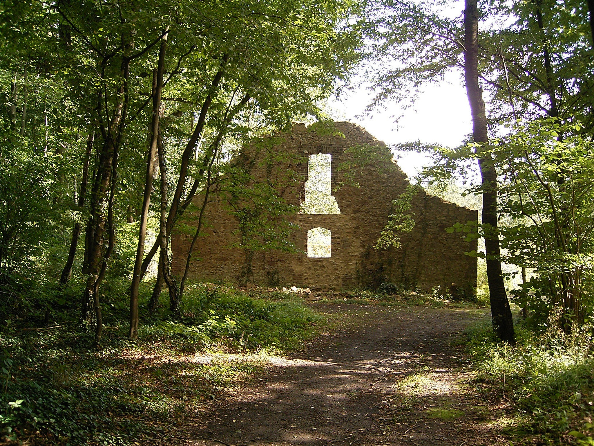 Karlsburg in Langerwehe